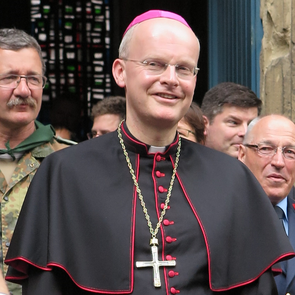 Bischof Franz-Josef Overbeck (Diözesanbischof des Bistums Essen) in seiner Funktion als Militärbischof vor der Kirche St. Foillan in Aachen nach einem Pilgergottesdienst für die Bundeswehr anlässlich der Aachener Heiligtumsfahrt 2014.